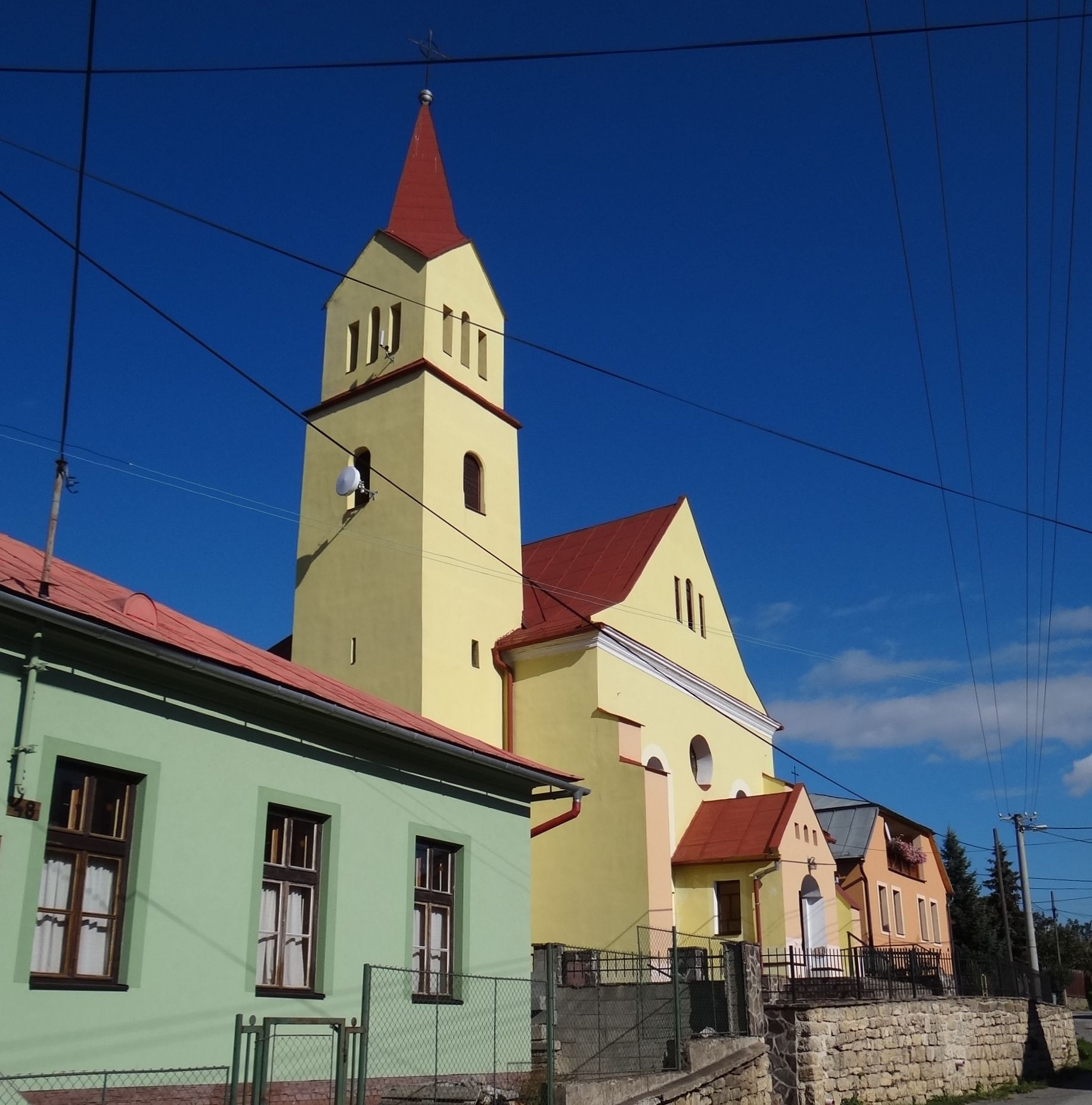 Rímsko-katolícky Kostol svätých Šimona a Júdu v Abrahámovciach (okr. Kežmarok)